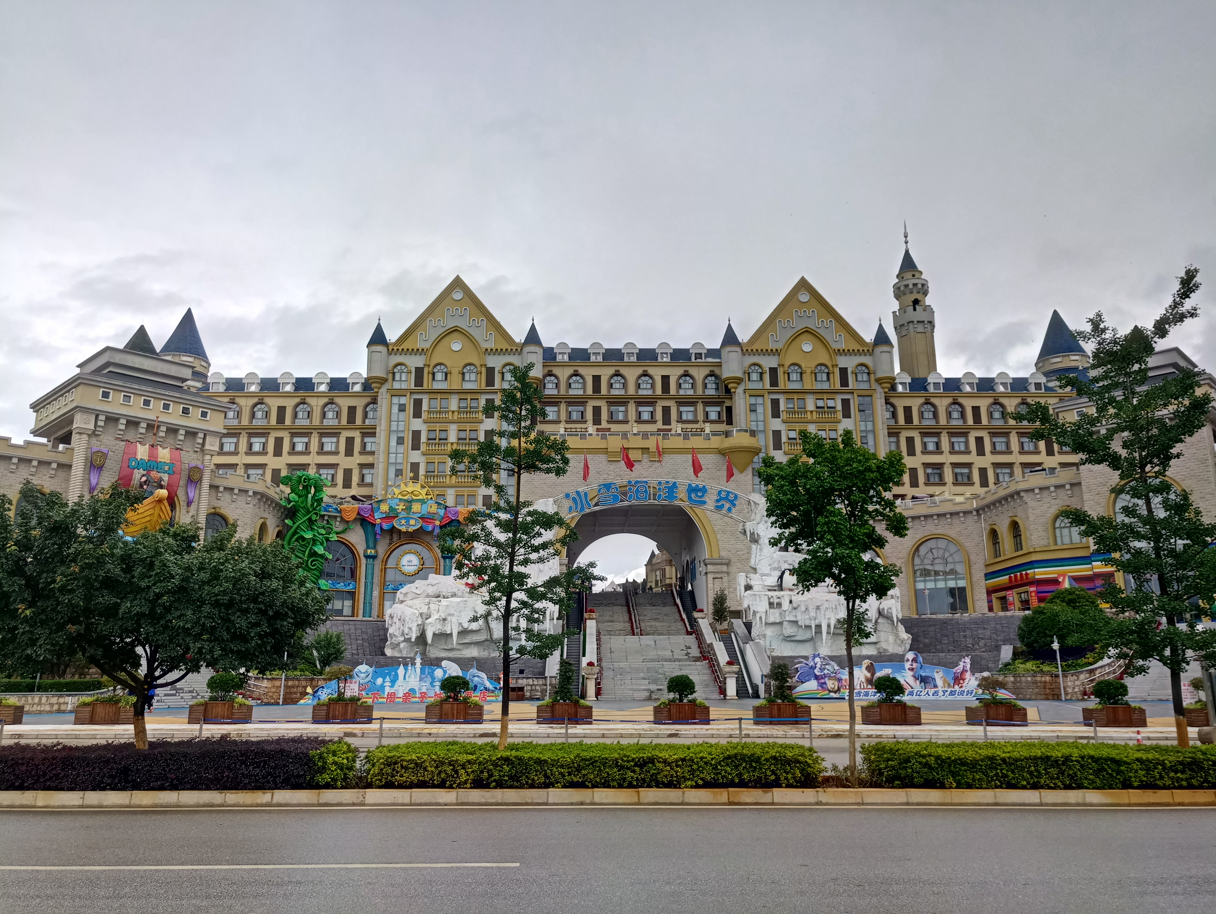 中文（中国大陆）: 石林冰雪海洋世界